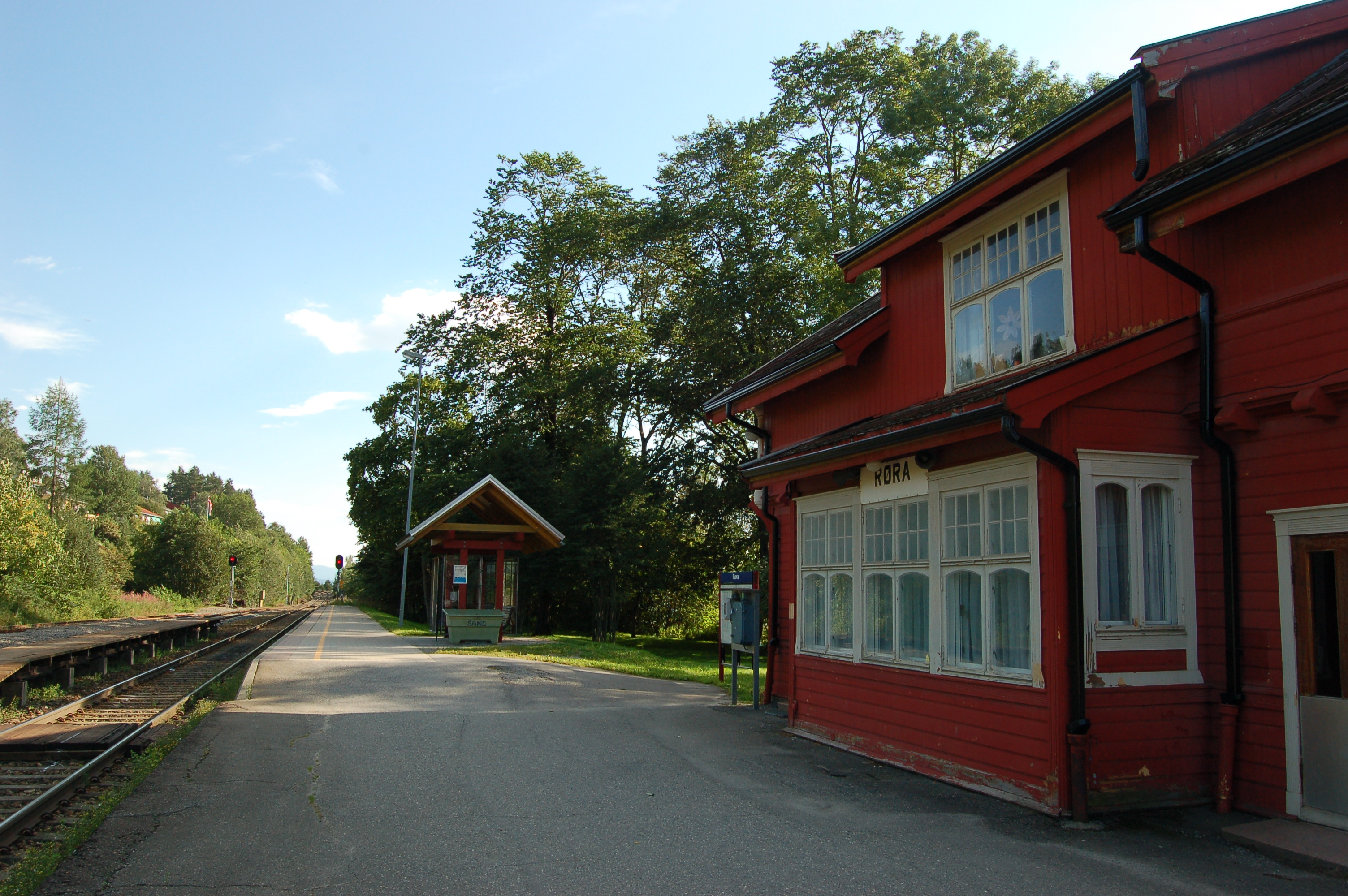 Røra Station on Nordlandsbanen in Inderøy, Norway